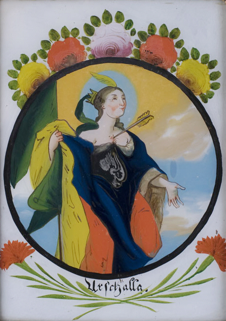 Hl. Ursula mit pfeildurchbohrter Brust, Hinterglasbild, Anfang 18. Jahrhundert, 24,5 x 18 cm